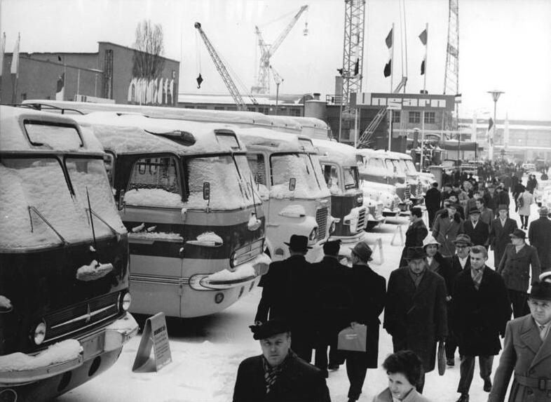 Zentralbild-Kohls-Gahlbeck SD-L 6.2.1962 Leipziger Frühjahrsmesse 1962 Freiglände der Technischen Messe Trotz einer leichten Schneedecke finden die Exponate der Kollektivausstellung der Volksrepublik Ungarn reges Interesse.